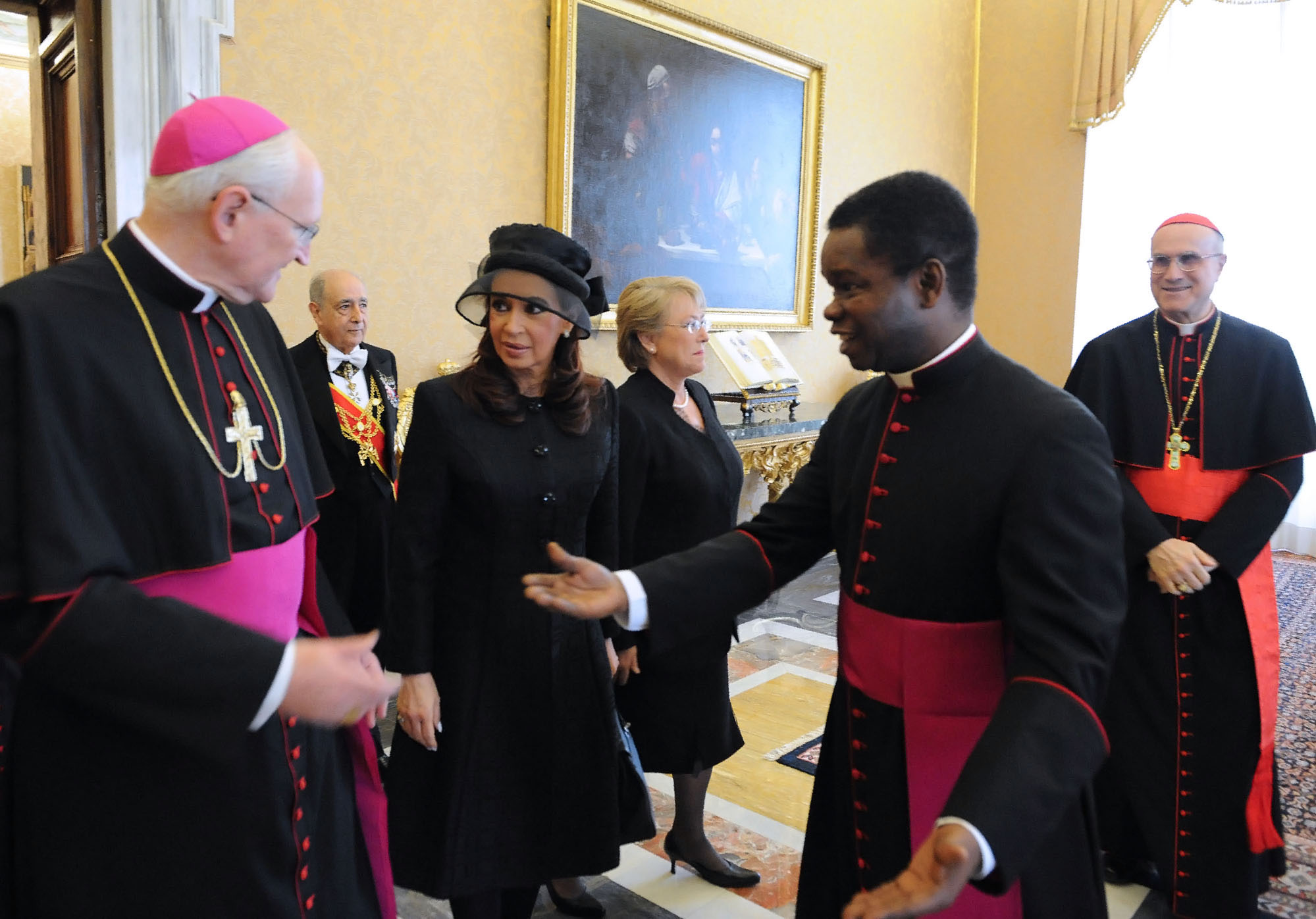 La presidenta Cristina Fernández durante su reunión con Benedicto XVI